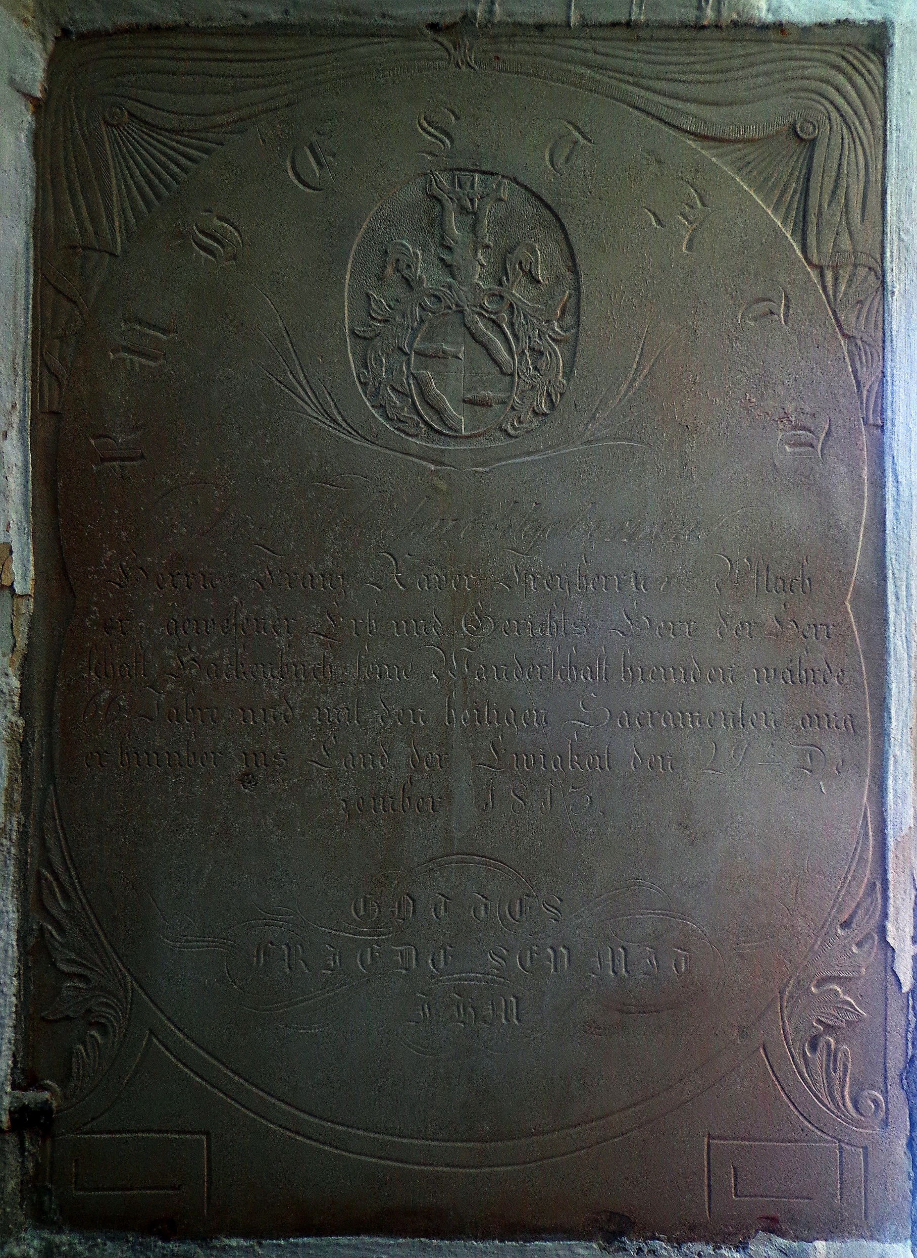 Grabdenkmal des Franz Xaver von Pflachern (+ 1813) in der Pfarrkirche von Sankt Marienkirchen bei Schärding. Eine wissenschaftliche Bearbeitung liegt vor in SEDDON Christopher R., Die inschriftlichen Denkmäler der Herren und Freiherren von Hackledt. Grablegen, Memoria und Repräsentation eines Innviertler Landadelsgeschlechtes, Wien (Dipl. Arb.) 2002, S. 213-216.